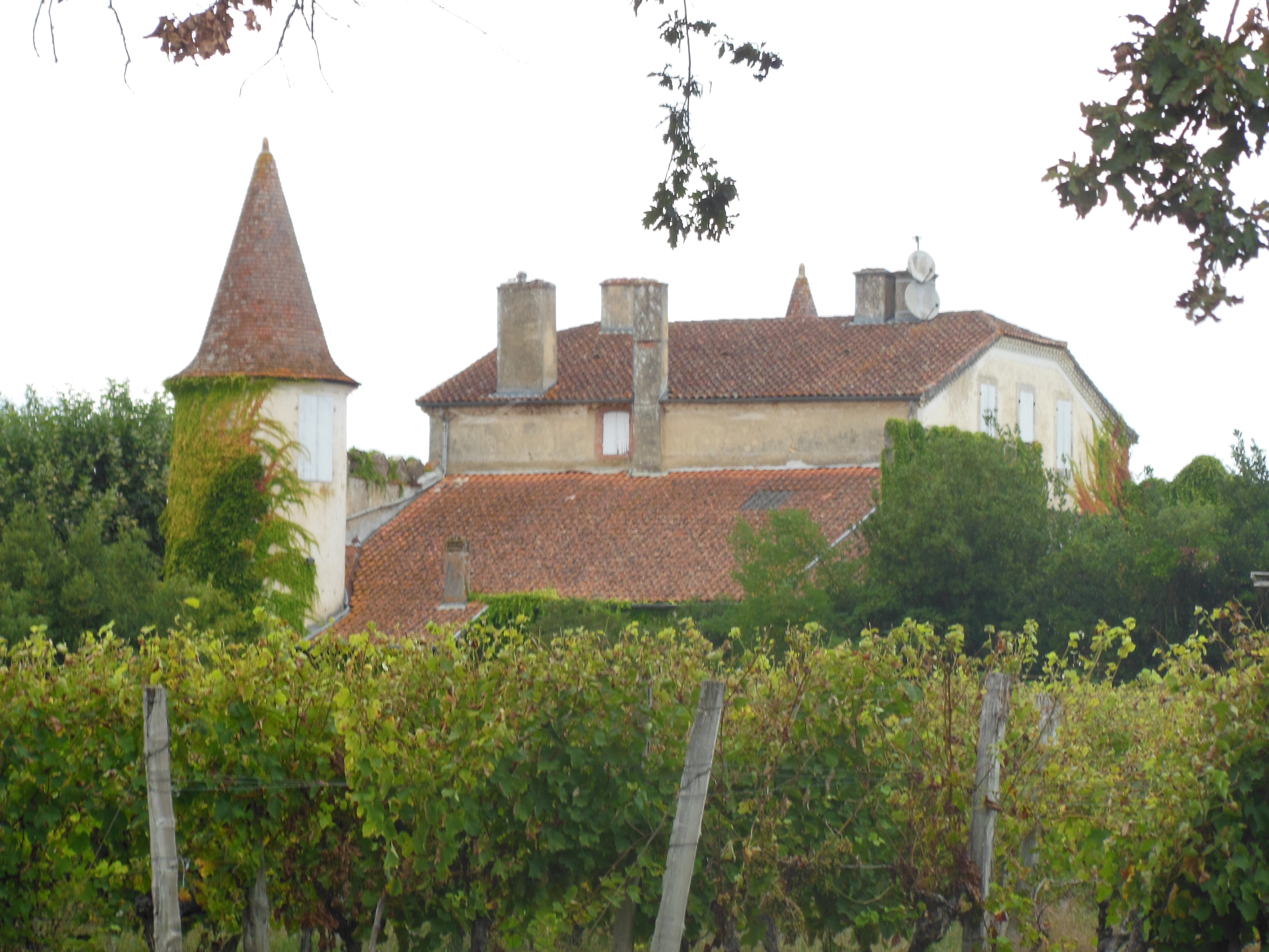 Château Juliac de Betbezer-d'Armagnac, dans le département français des Landes